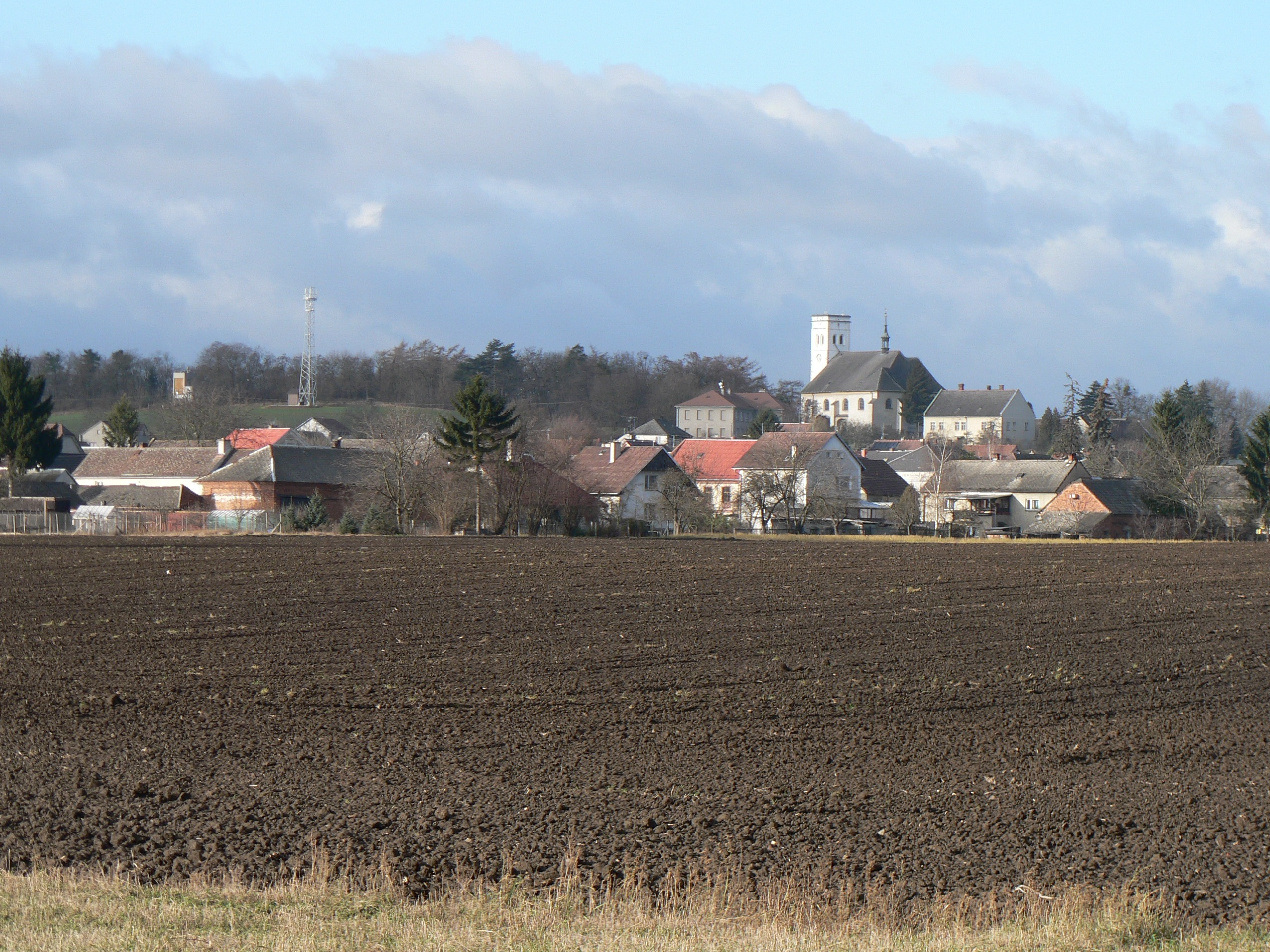 Pohled na Medlov od severu